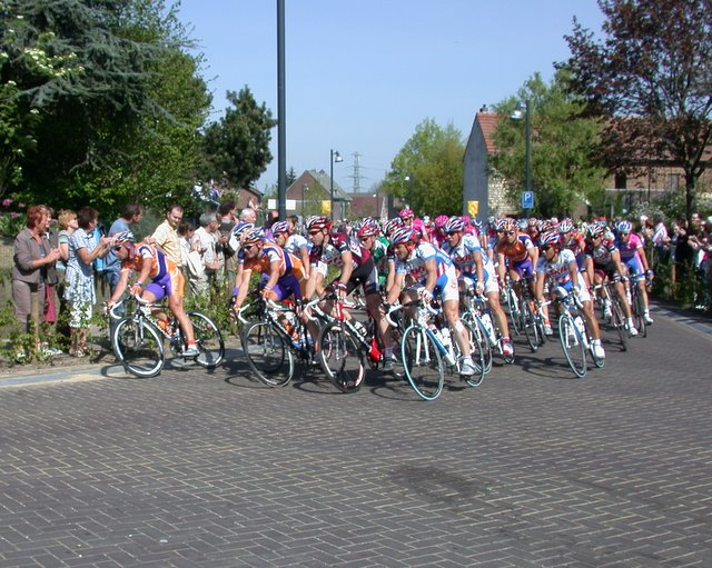 Amstel Gold Race 2007: Doorkomst Ubachsberg